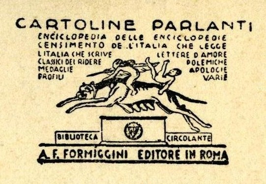 Publicité pour les éditions Formiggini à Rome : la louve romaine comique et galopante.